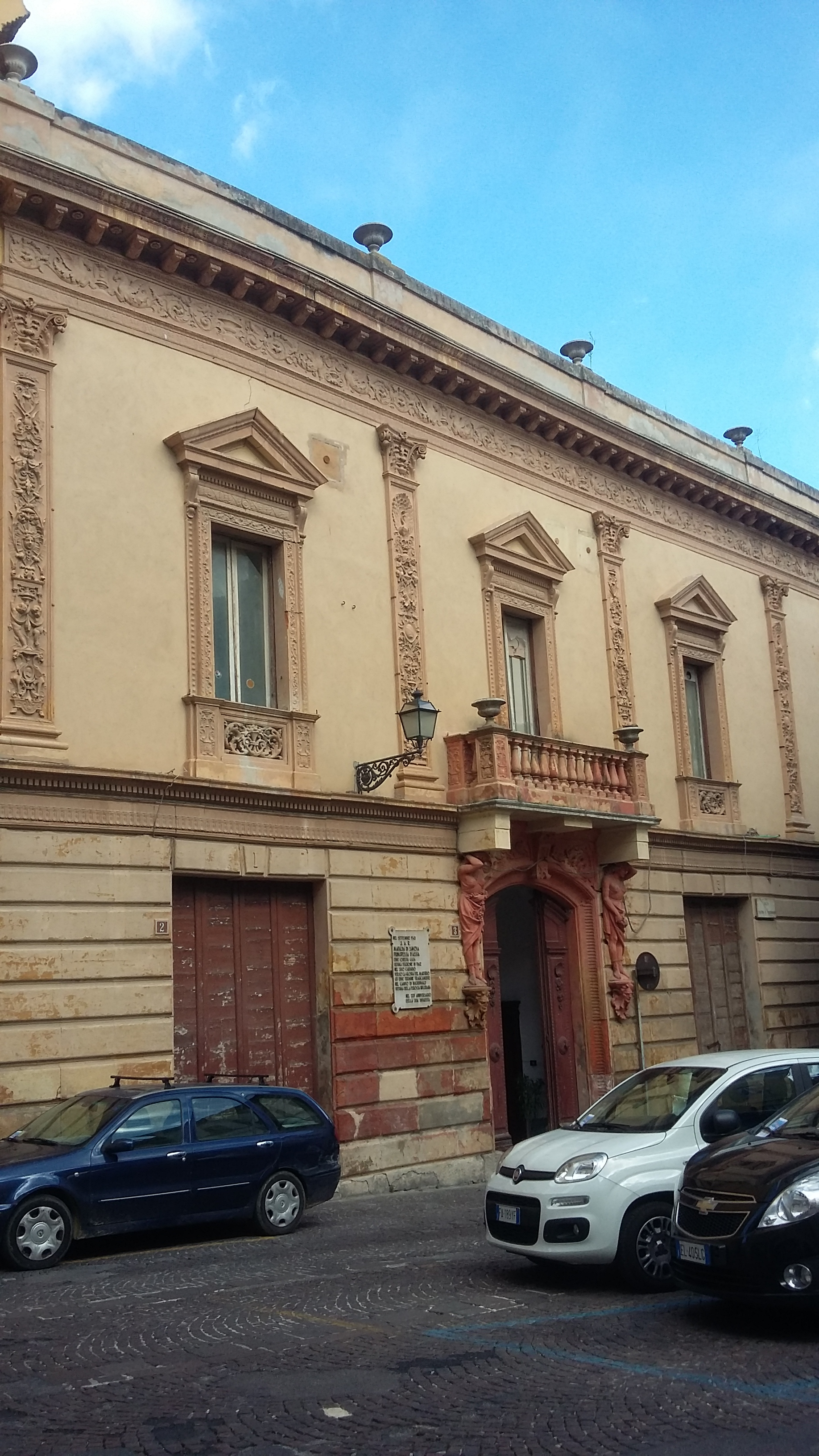 Il Palazzo Massangioli è un' antica dimora aristocratica ubicata tra il quartiere San Giovanni e il centro. La facciata qui ritratta è quella di Piazza Umberto I.